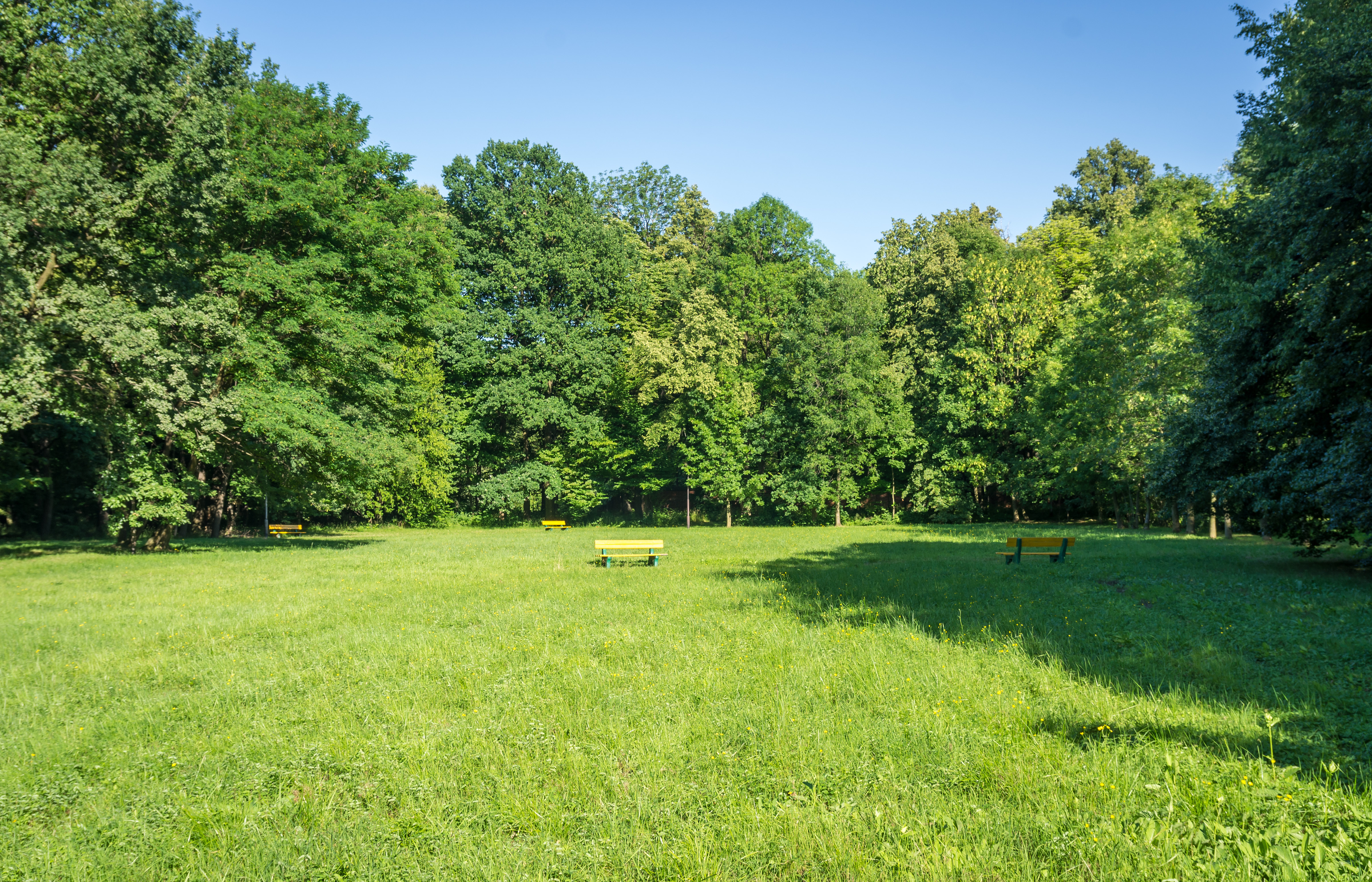 Pieszyce, park, XVII, XVII(/XIX This photo of Lower Silesian Voivodeship was taken during Wikiexpedition 2013 set up by Wikimedia Polska Association. You can see all photographs in category Wikiekspedycja 2013.